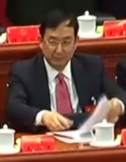 中国科学院院士王曦，摄于十九大期间